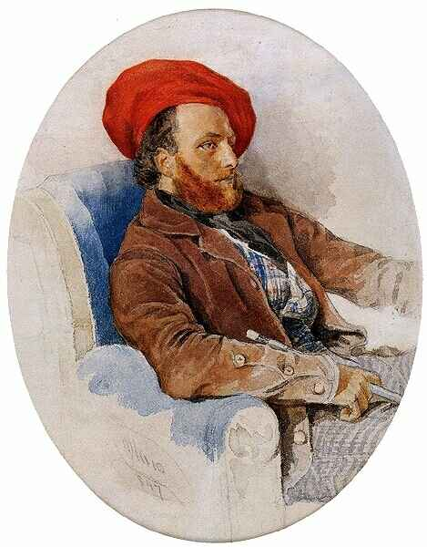 Feszl Frigyes (1821–1884) építész portréja. Sterio Károly festménye (1847)